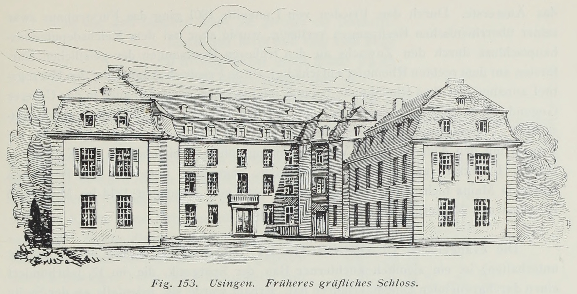 Usingen Früheres gräflisches Schloss